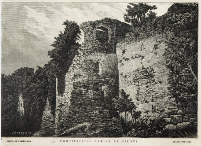 La Ilustració Catalana, número 011 20 Octubre de 1880 pàg. 85